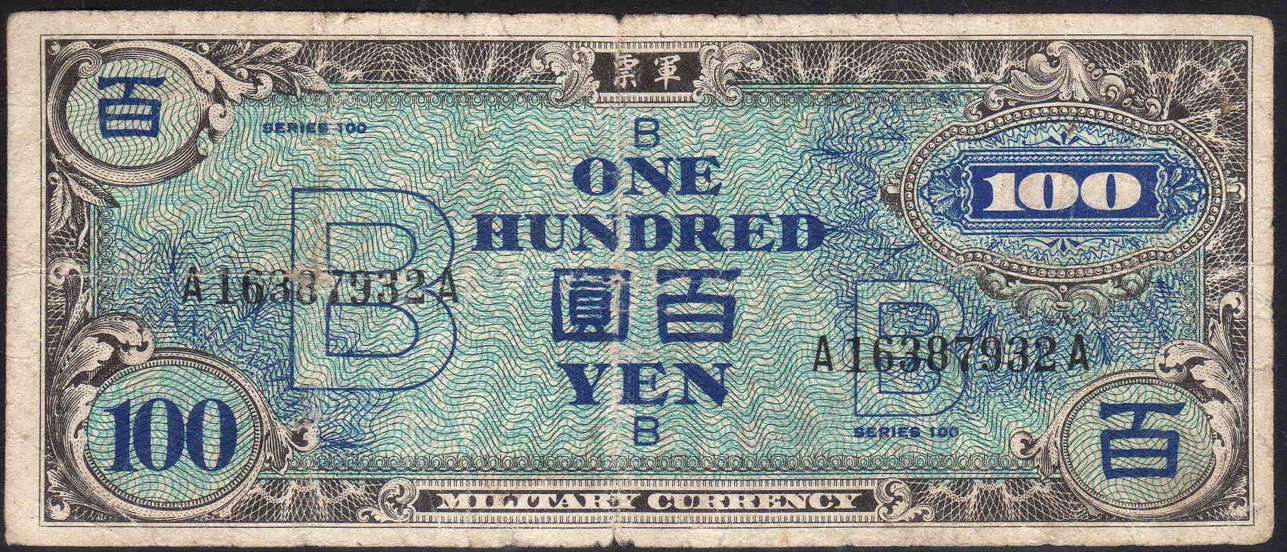 アメリカ合衆国に占領されていた当時の沖縄で使用されていた100B円紙幣